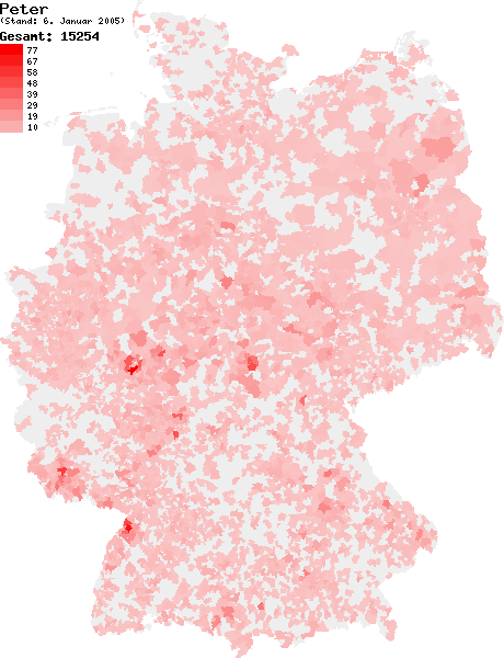 Verteilung des Nachnamens Peter in Deutschland nach dem Telefonbuch mit Stand vom 6. Januar 2005